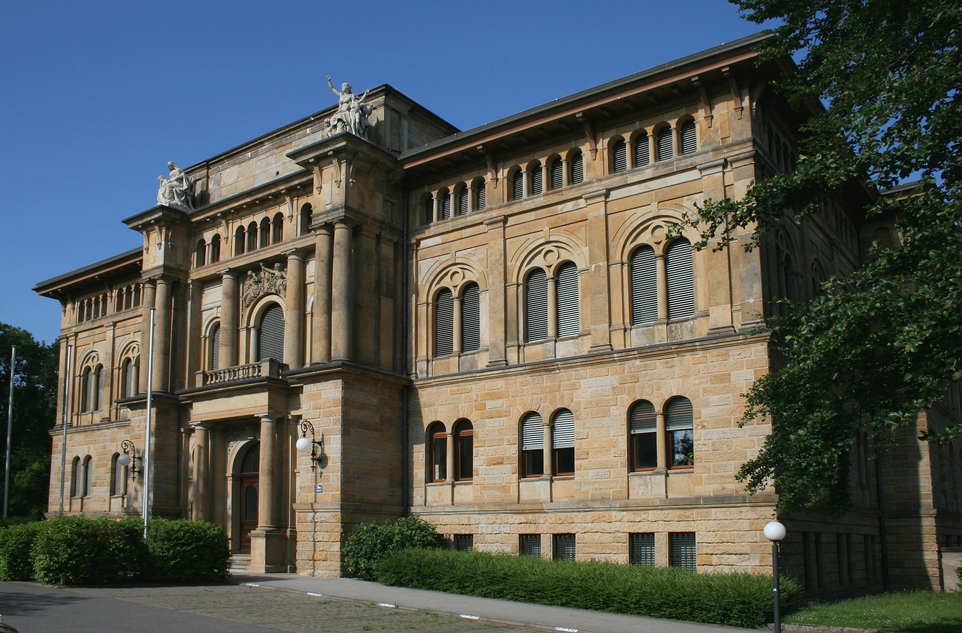 Gebäude des Thüringer Finanzgerichts und des Sozialgerichts Gotha in Gotha.